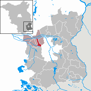 Briesen in Brandenburg (Country) - District Spree-Neiße